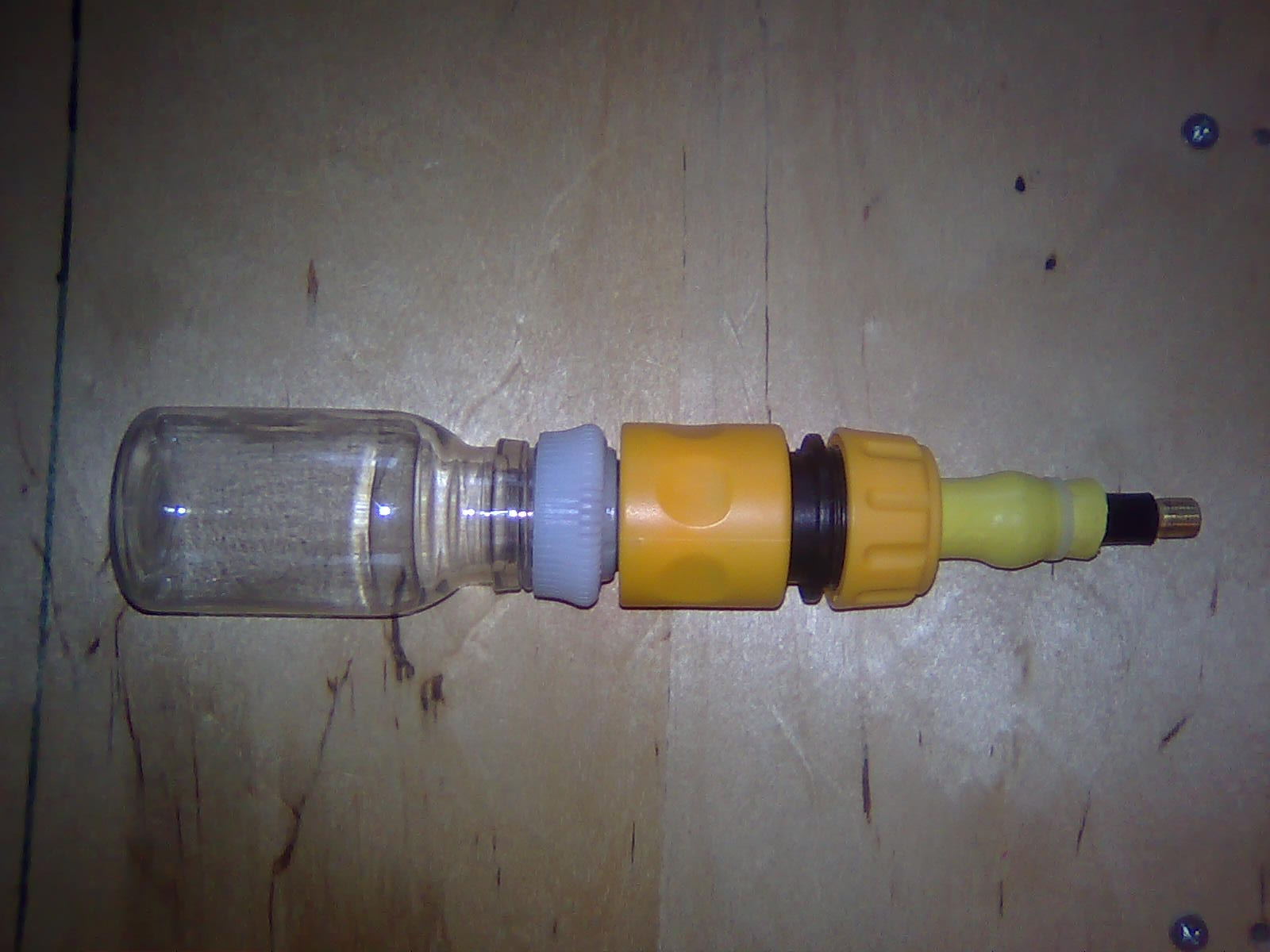 Прилад запуску у зібраному вигляді.